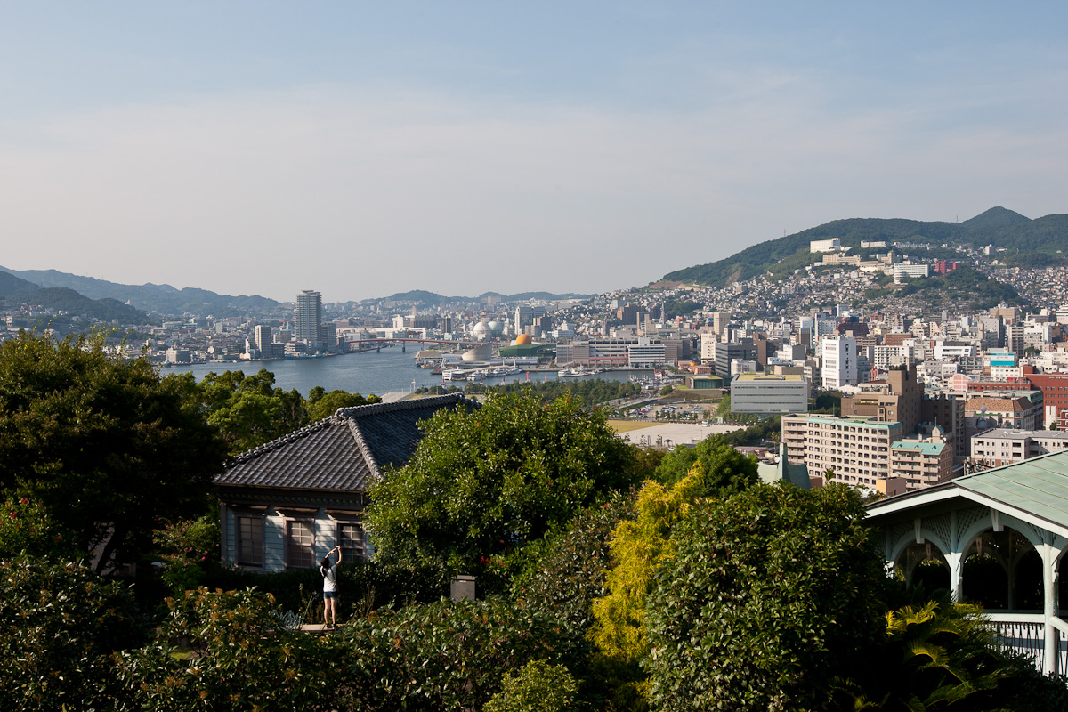 Nagasaki